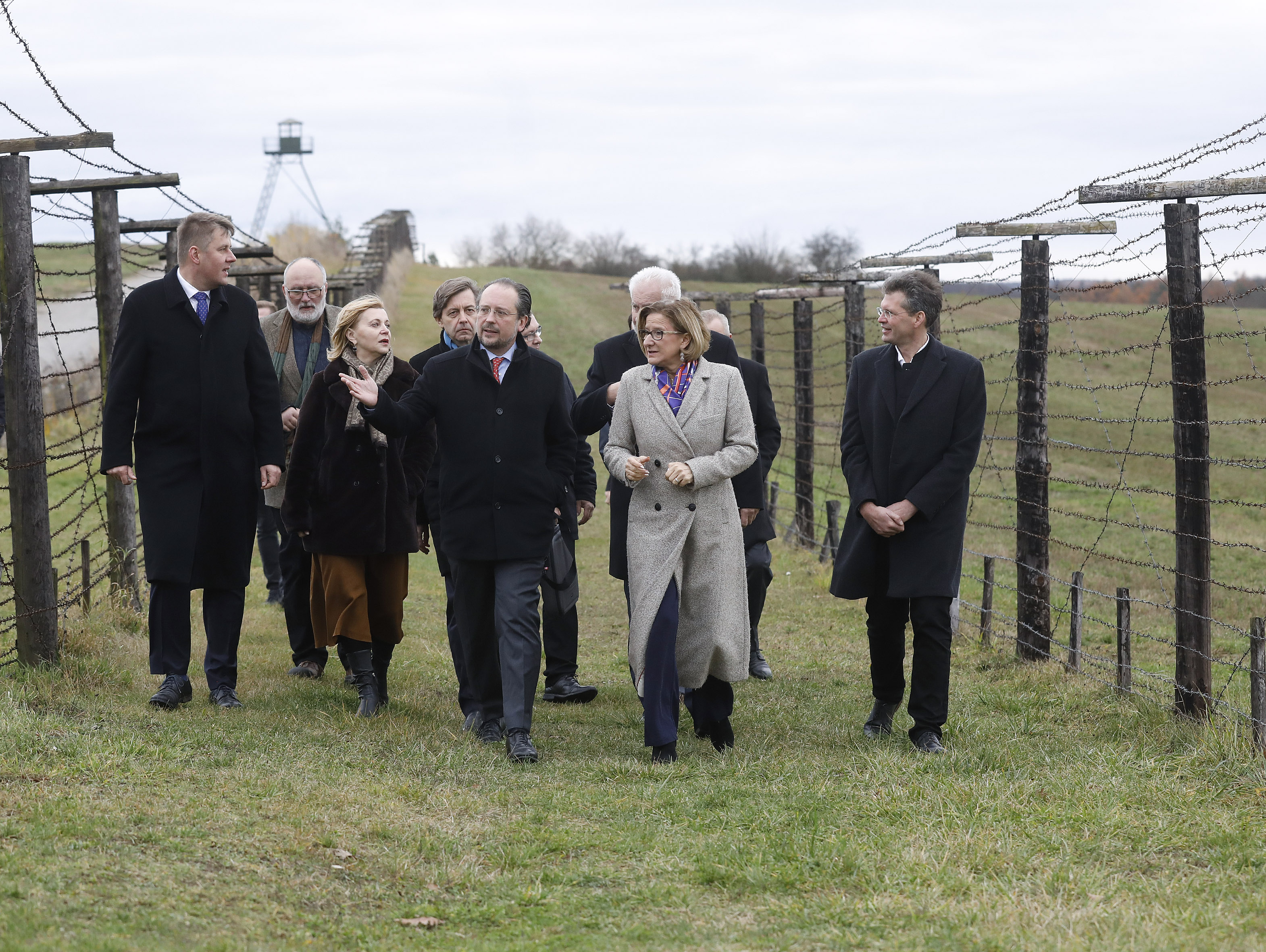 Gedenkveranstaltung in Hardegg - Cizov Anlässlich des 30. Jahrestags des Falls des Eisernen Vorhangs zwischen Österreich und der ehemaligen Tschechoslowakei mit BM Alexander Schallenberg und LH Mikl-Leitner sowie dem tschechischen Außenminister Tomas Petricek. 29.11.2019, Foto: Dragan Tatic